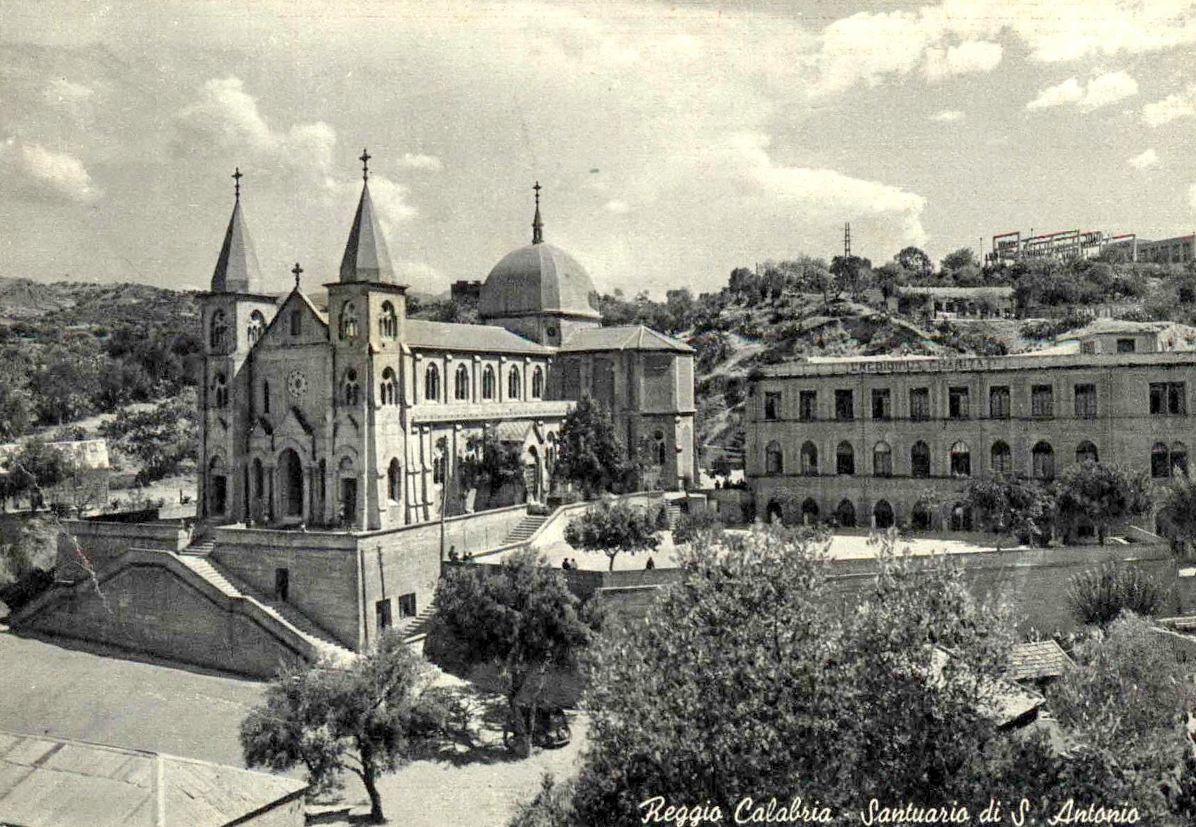 old postcard of Reggio Calabria